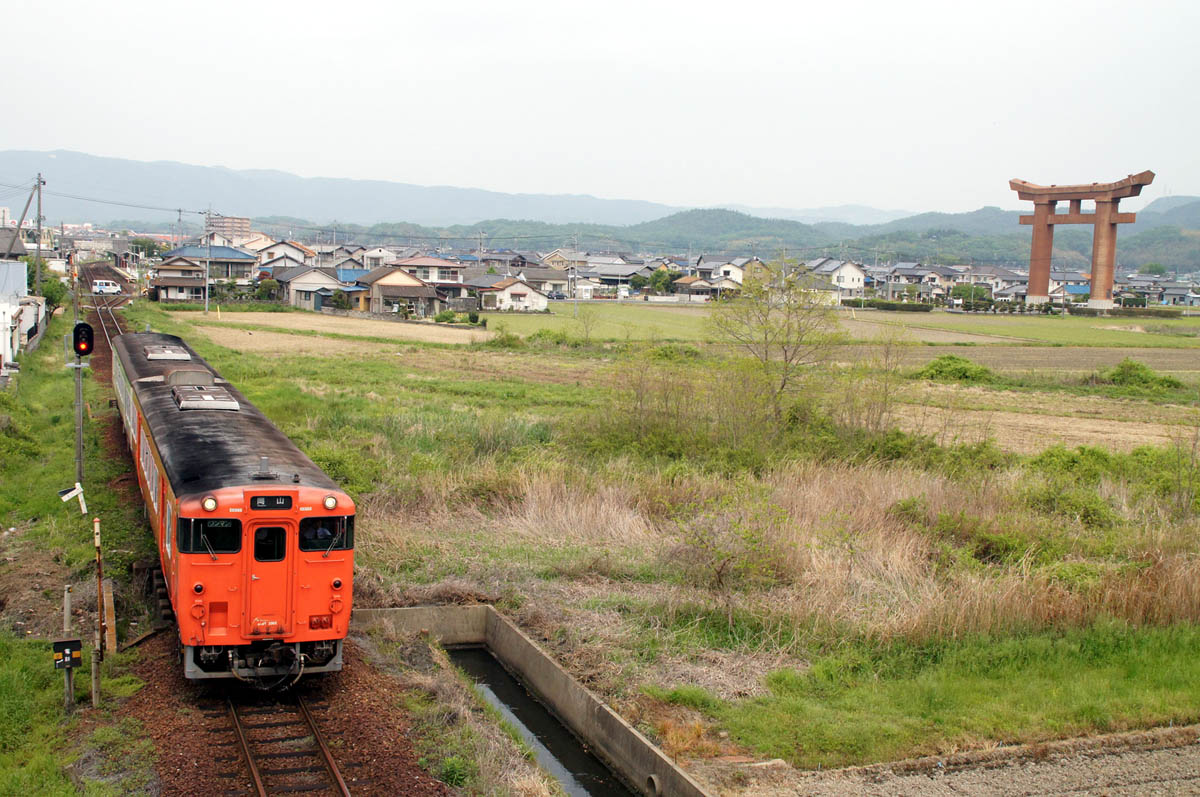 備中高松駅を発車するキハ47系。広報に見えるのは最上稲荷の大鳥居。